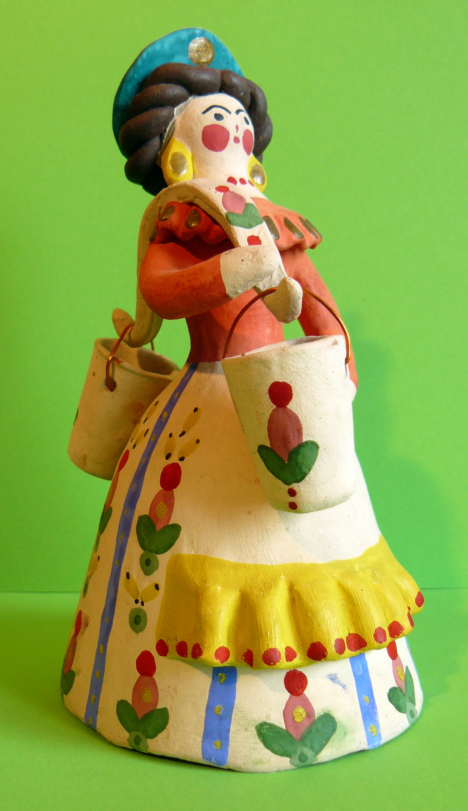 Jouet traditionnel de Dymkovo (Russie, oblast de Kirov) : Porteuse d'eau. Hauteur : 17 cm